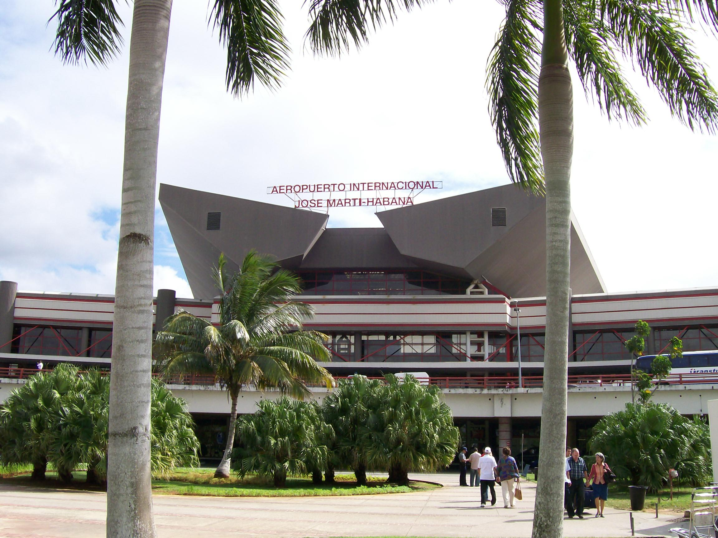 Aeropuerto Internacional Jose Martí, La Habana, Cuba.